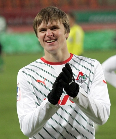 Виталий Лысцов в 2012 году